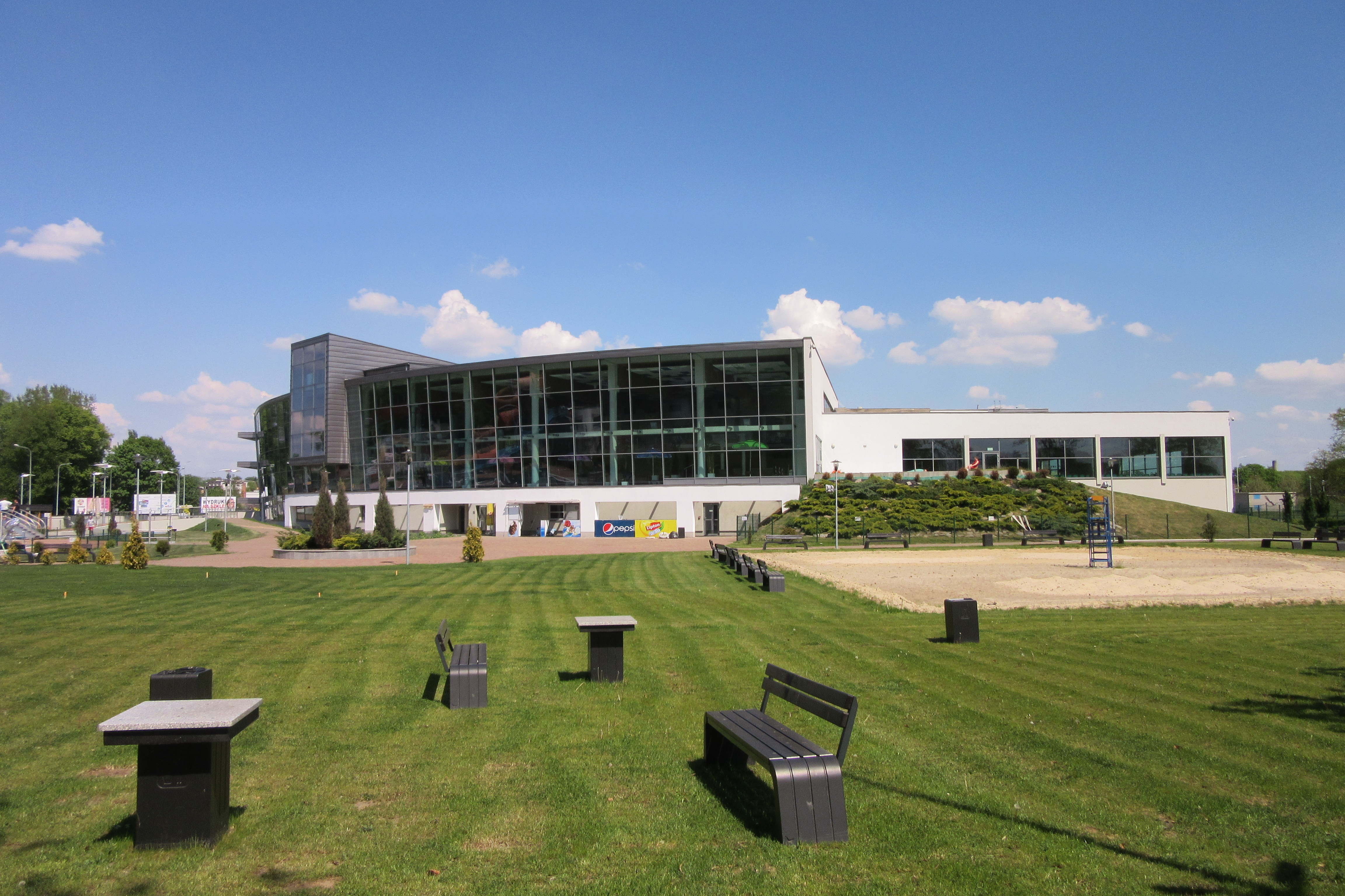 Aquapark w Kaliszu